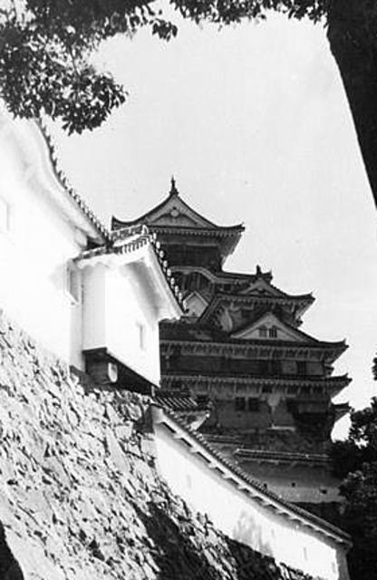 戦時中（昭和17年頃）の写真。空襲から守るために黒い網（偽装網）を掛けられた姫路城